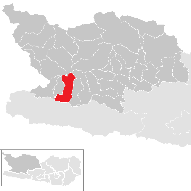 Bezirk Spittal an der Drau